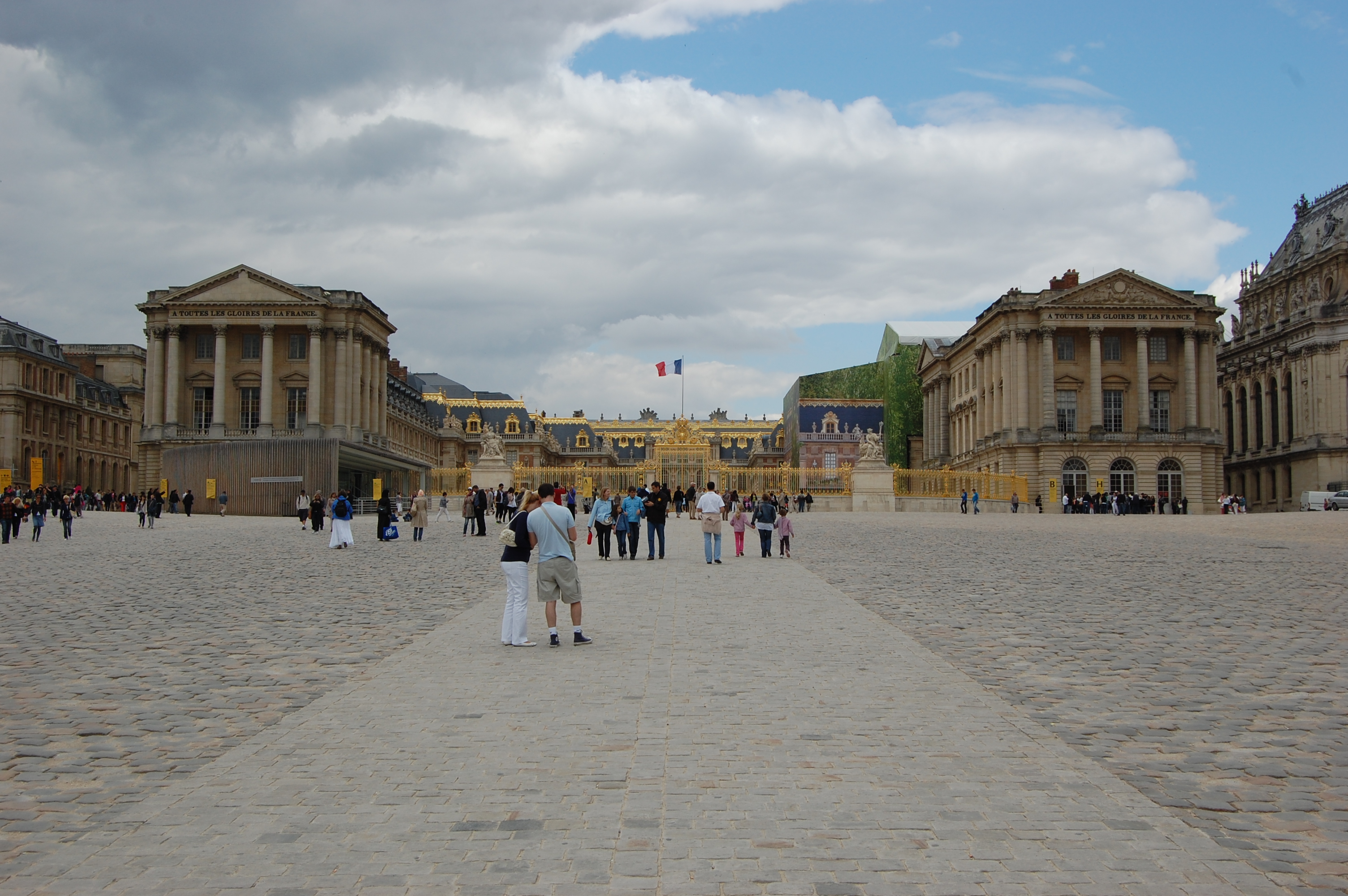 Château de Versailles depuis la cour d'honneur